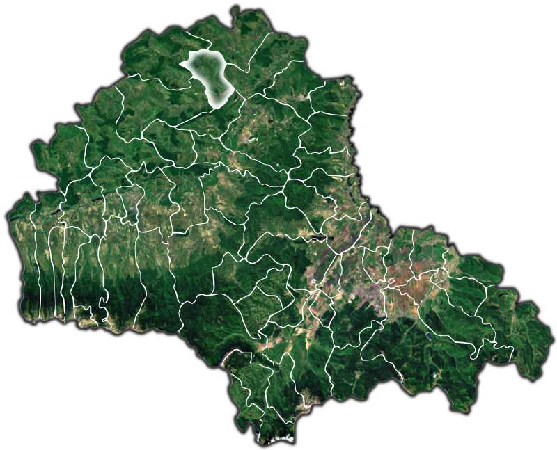 Rupea jud Brasov